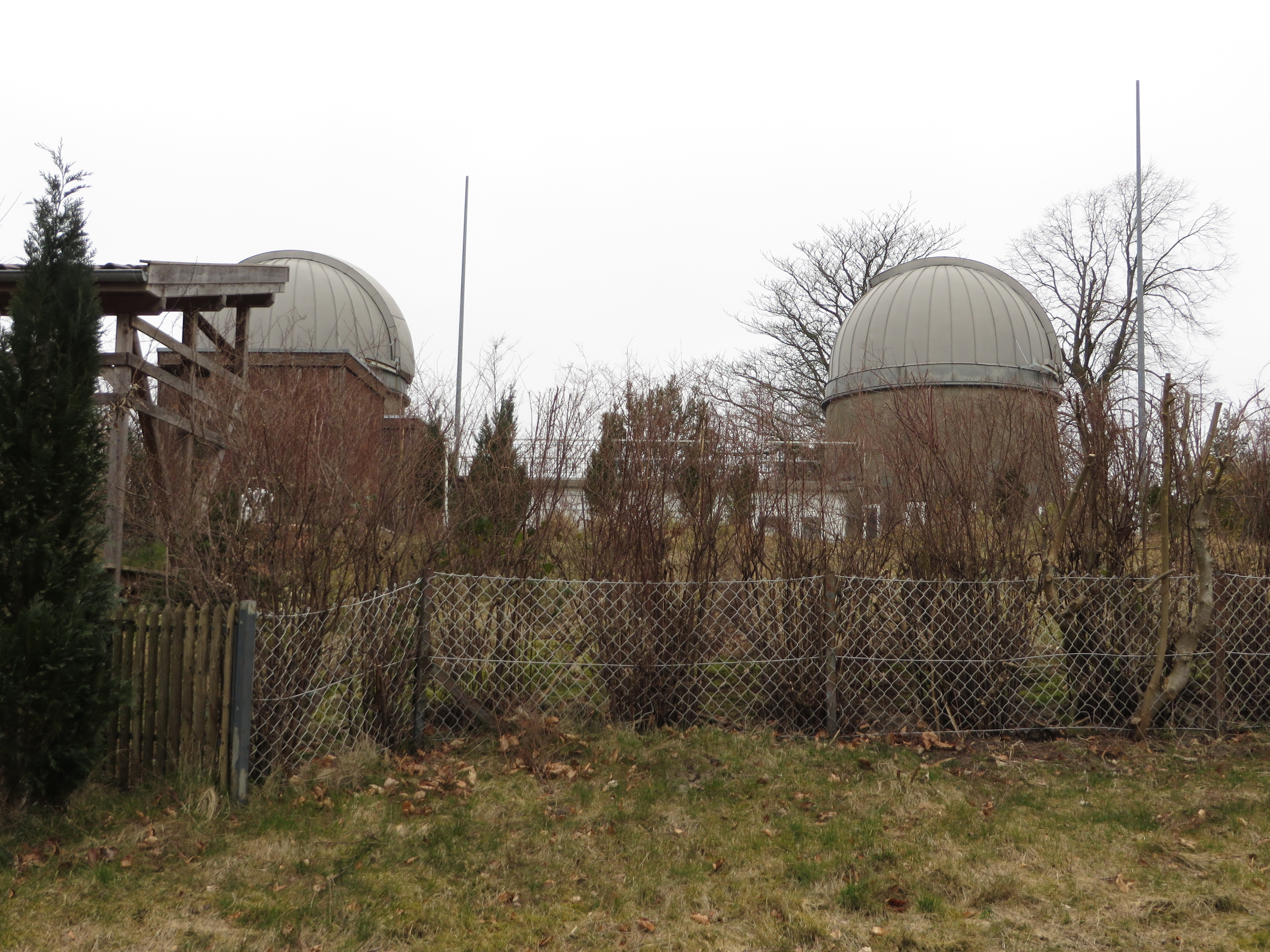 Menke-Sternwarte (Glücksburg 2015)